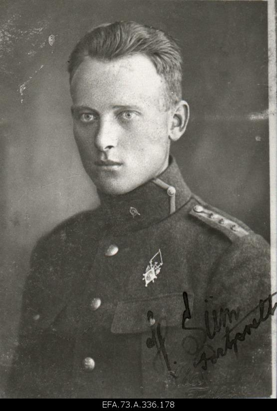 Sõjaväe Ühendatud Õppeasutuste Sõjakooli portupee veltveebel Hugo Siim